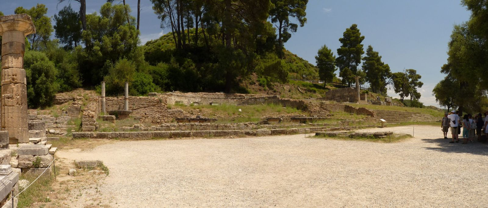 Olympia (Greek: Ολυμπία Olympía), a sanctuary of ancient Greece in Elis, is known for having been the site of the Olympic Games in classical times, the most famous games in history. You can use the images for free. But a link to - I would be happy :)